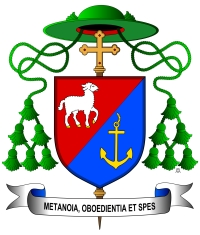 Znak biskupa Andreje Imricha